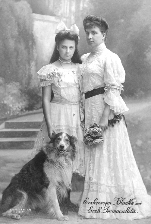 Blanka von Castilien, Prinzessin von Bourbon mit ihrer Tochter Maria Immatikulata, Erzherzogin von Österreich-Toskana.